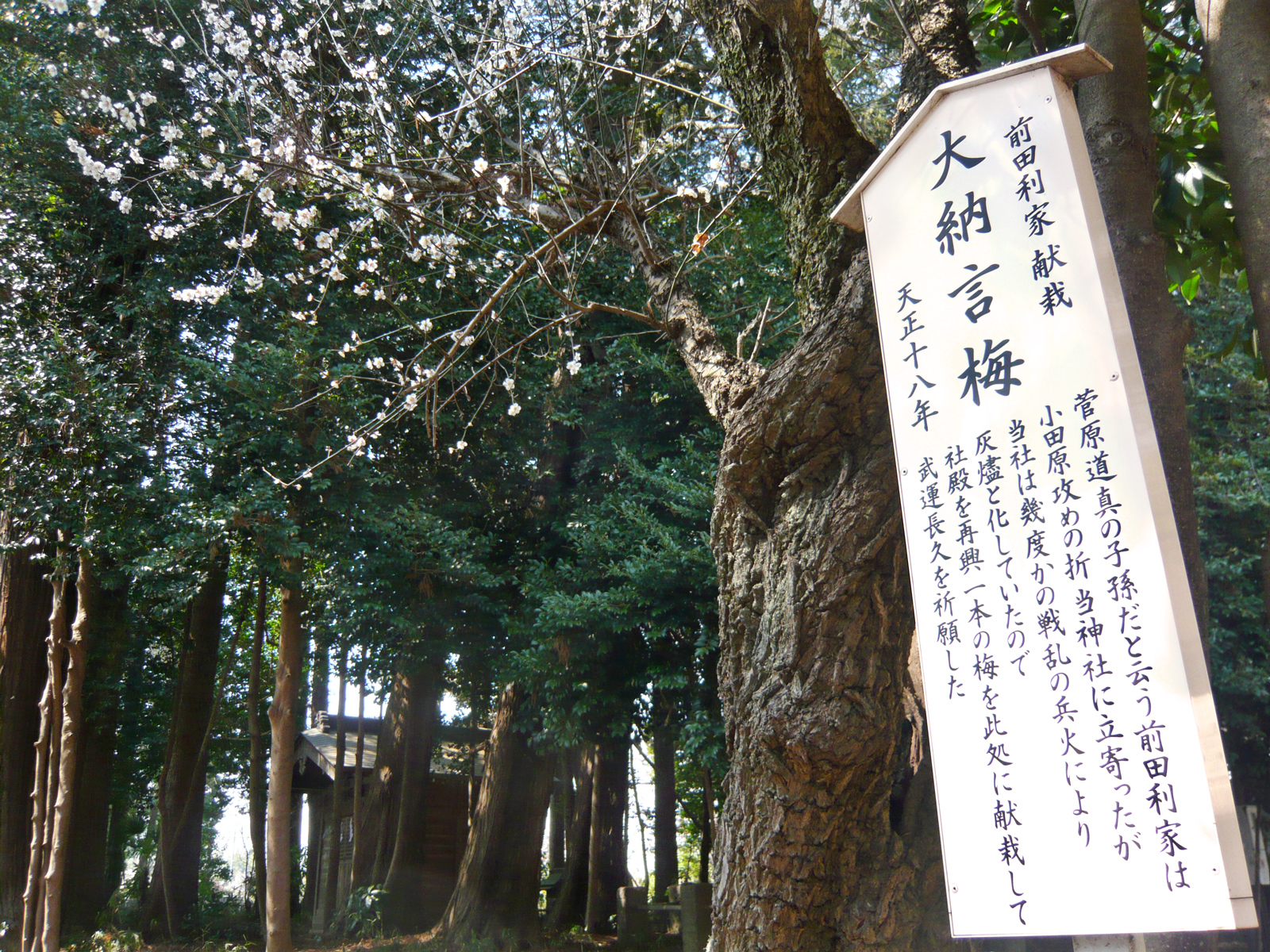 天正十八年 前田利家献栽 大納言梅（2014年現在は二代目） - 北野天神社 (所沢市)にて